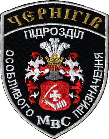 Емблема батальйону особливого призначення МВС України «Чернігів».